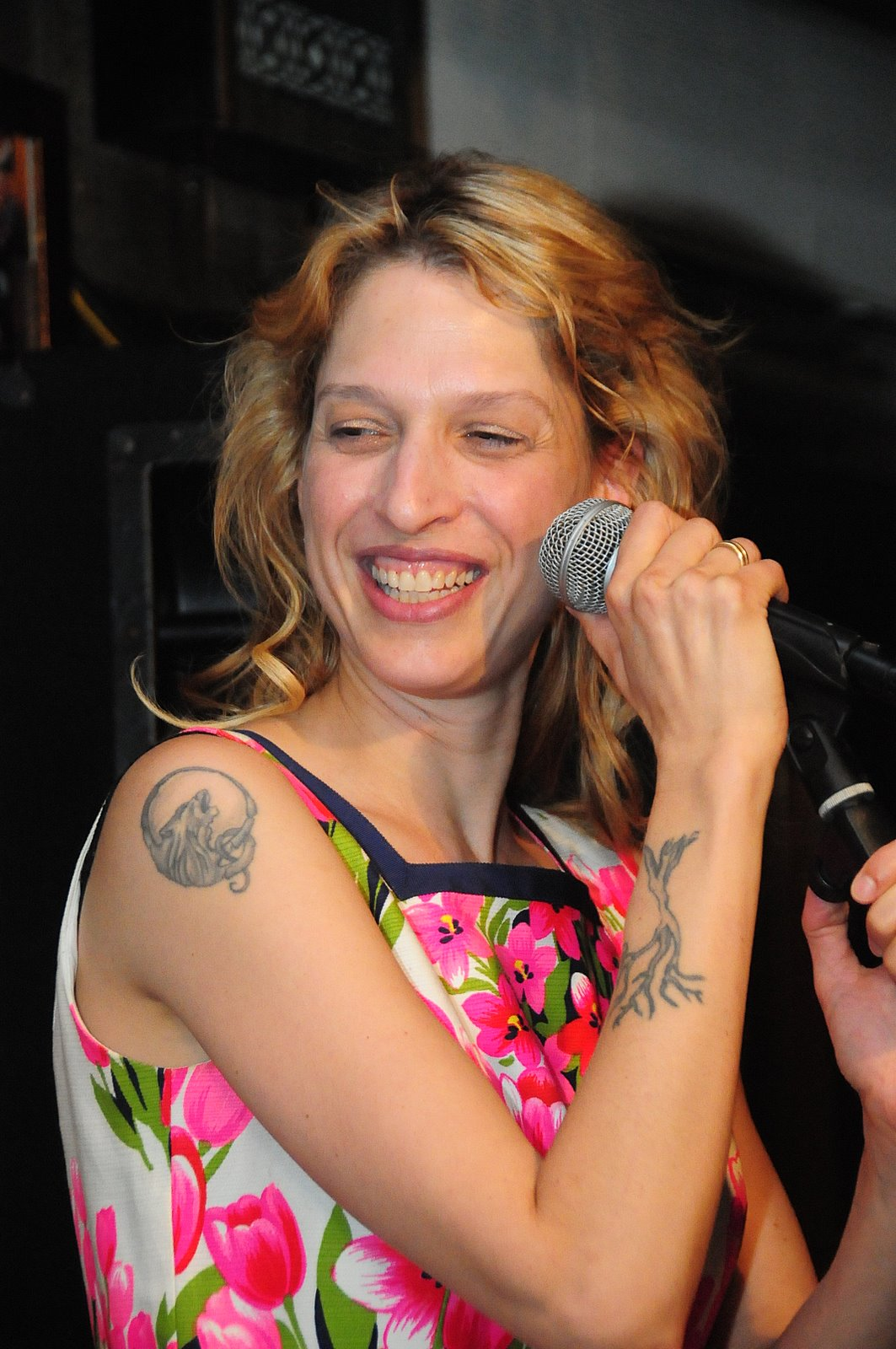 Mika Karni מיקה קרני